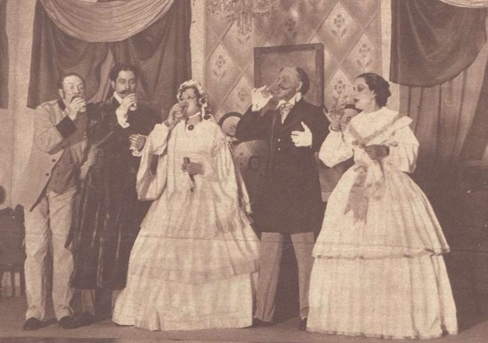 Escena del estreno de la obra de teatro Cuatro corazones con freno y marcha atrás, del dramaturgo español Enrique Jardiel Poncela